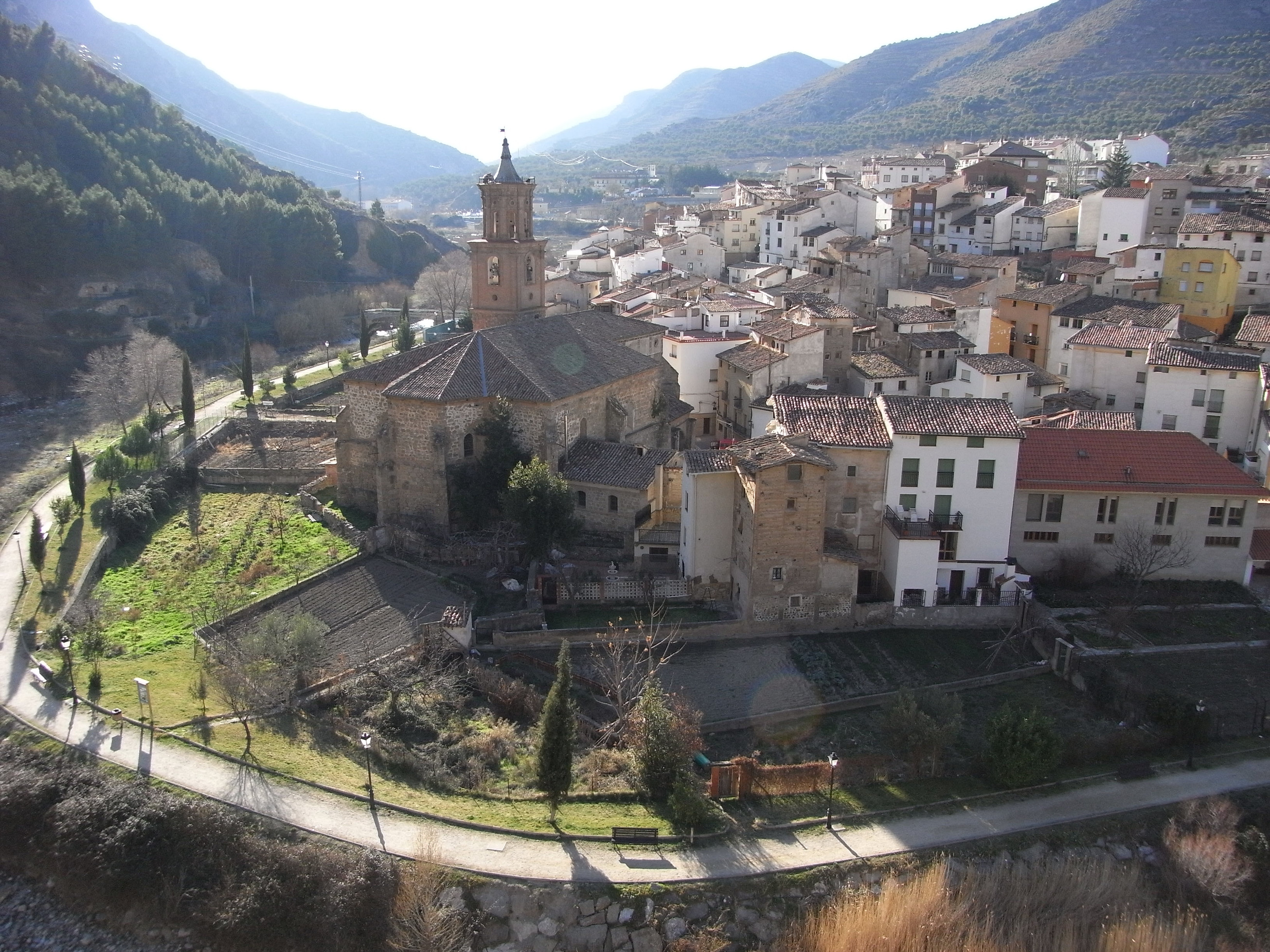 Entorno de la Iglesia de San Servando y San Germán en Arnedillo, La Rioja (España)